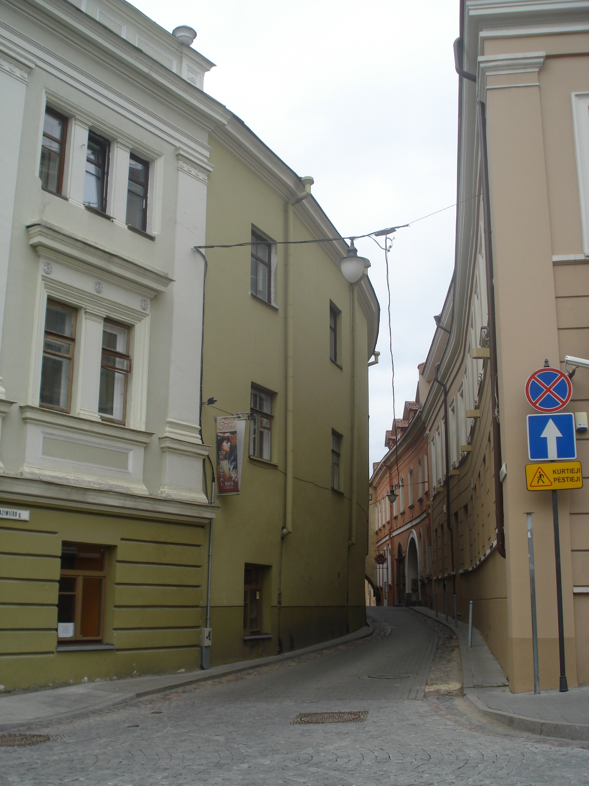 Švento Kazimiero gatvė (St Casimir street) in Vilnius